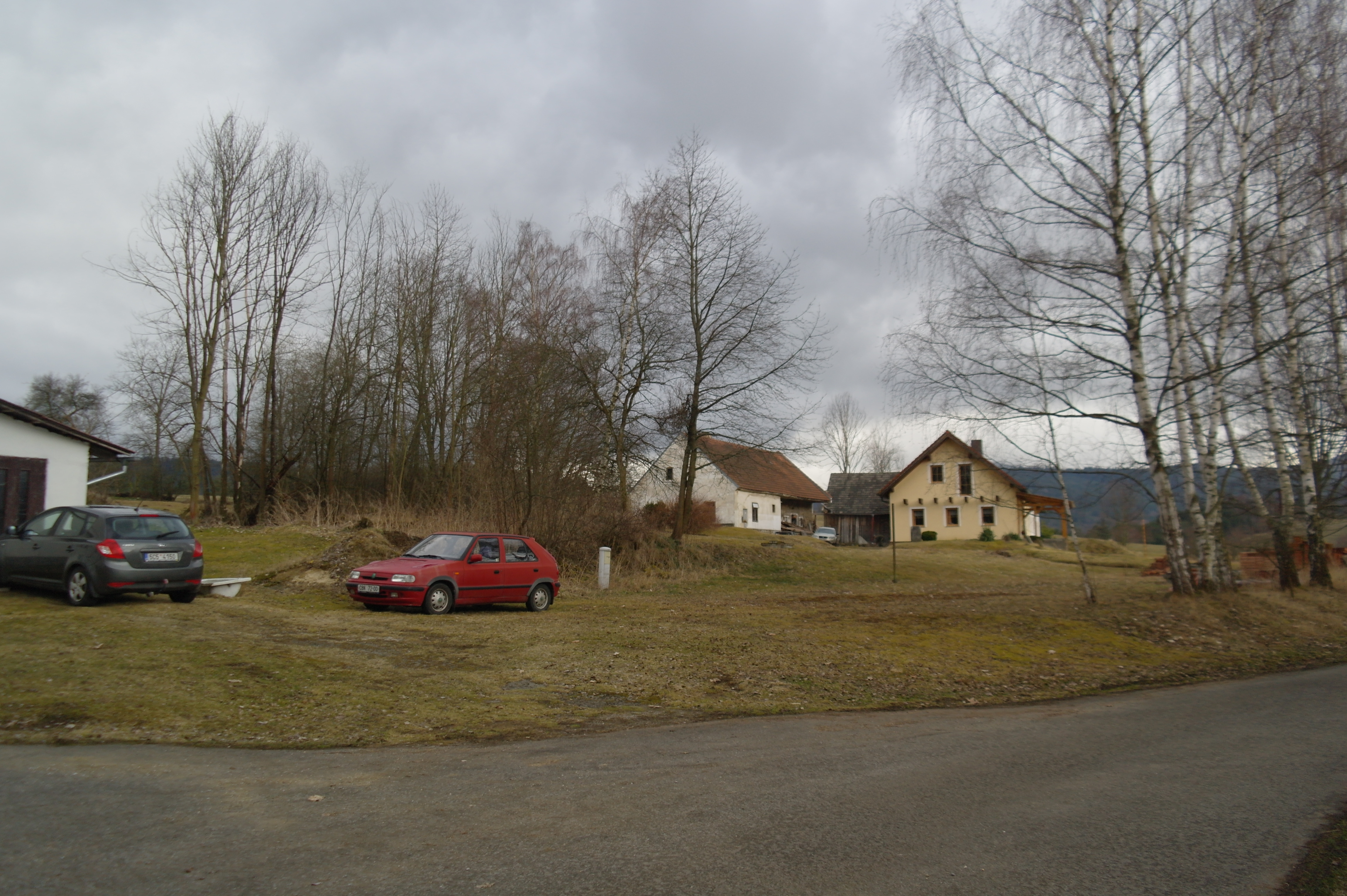 Saladín, domy čp. 12 a 17